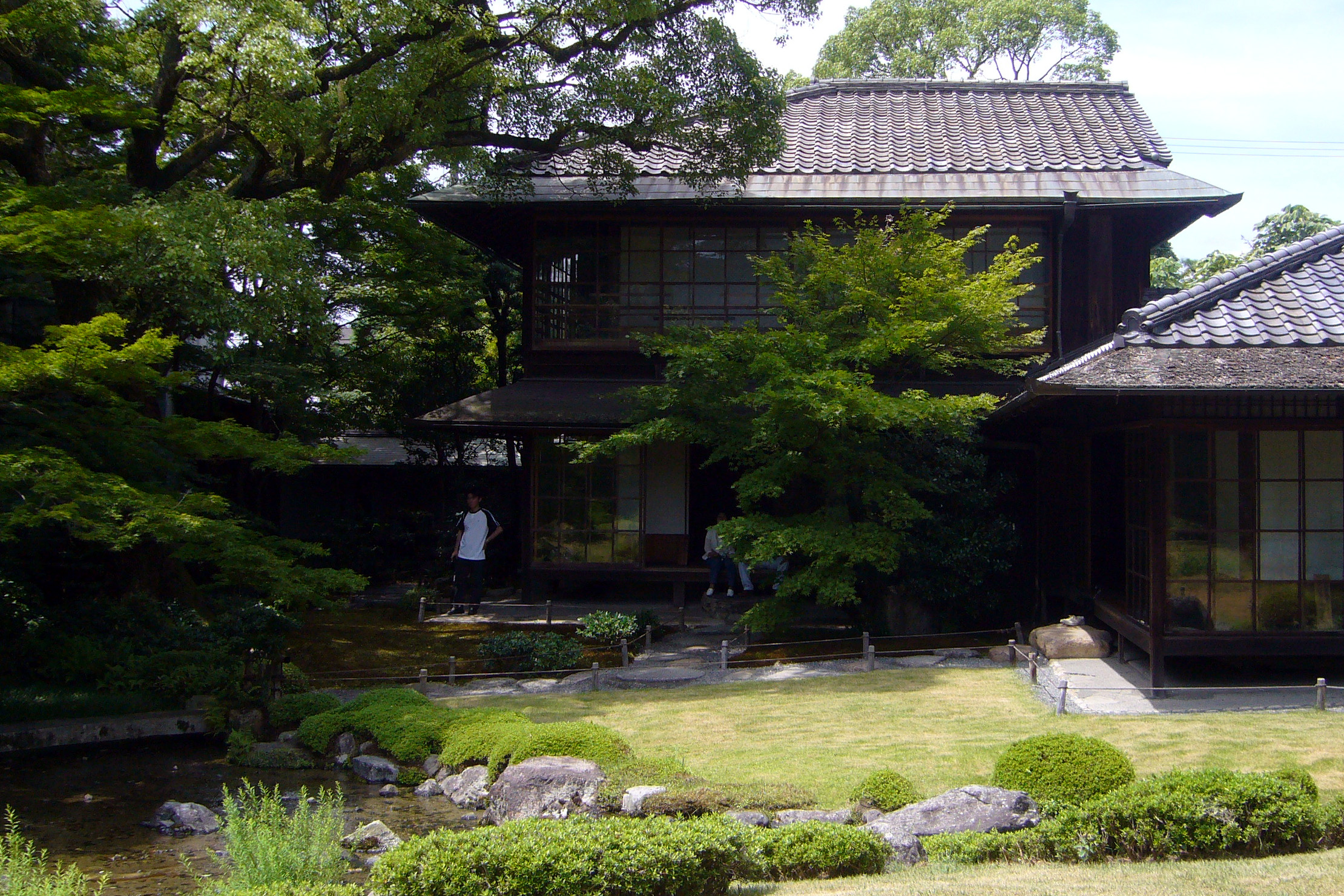 Murinan, Kyoto, Japan